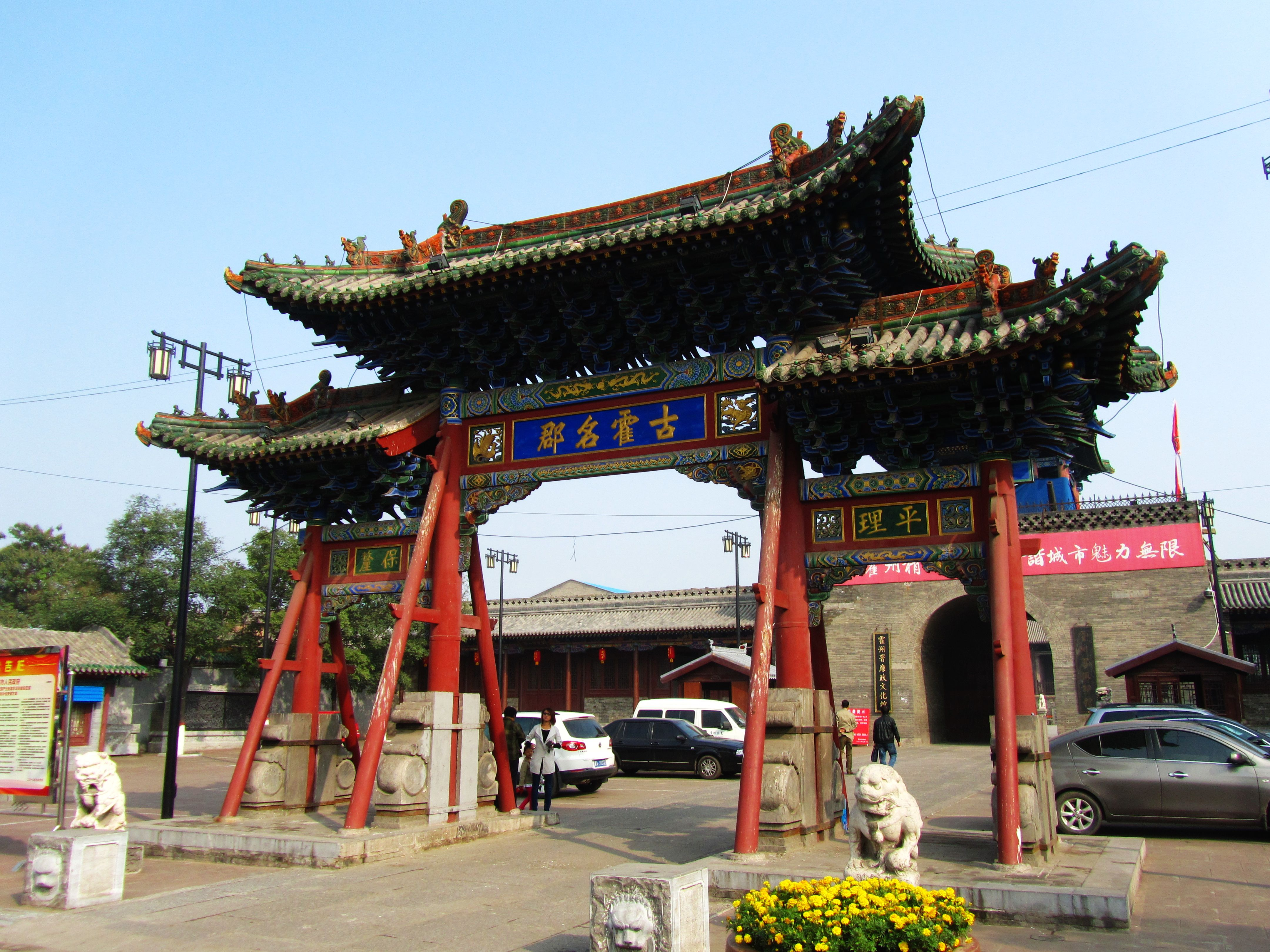 霍州州署，牌坊。